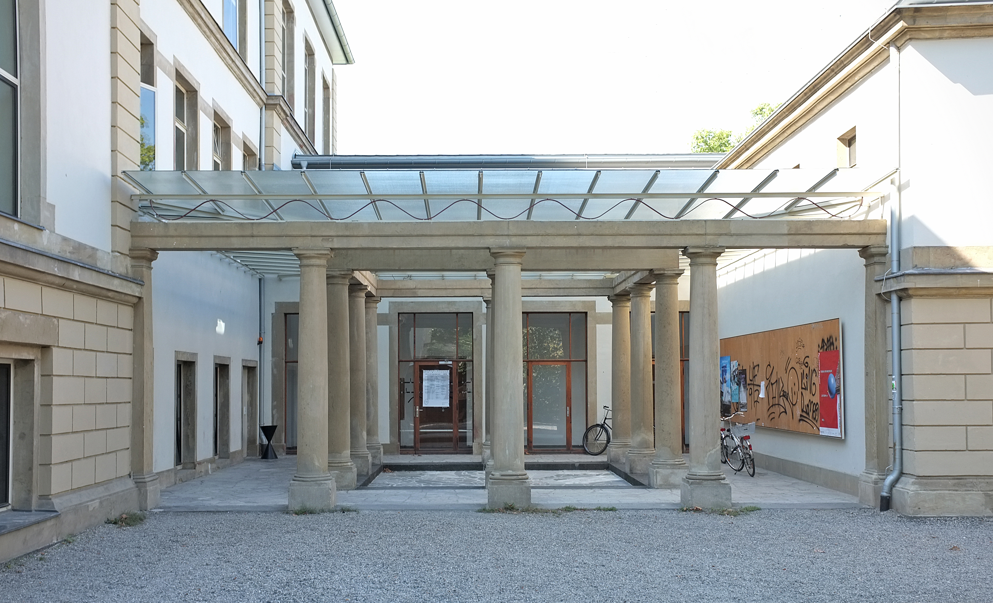 Haupteingang Dürerstraße, Städelschule 2016